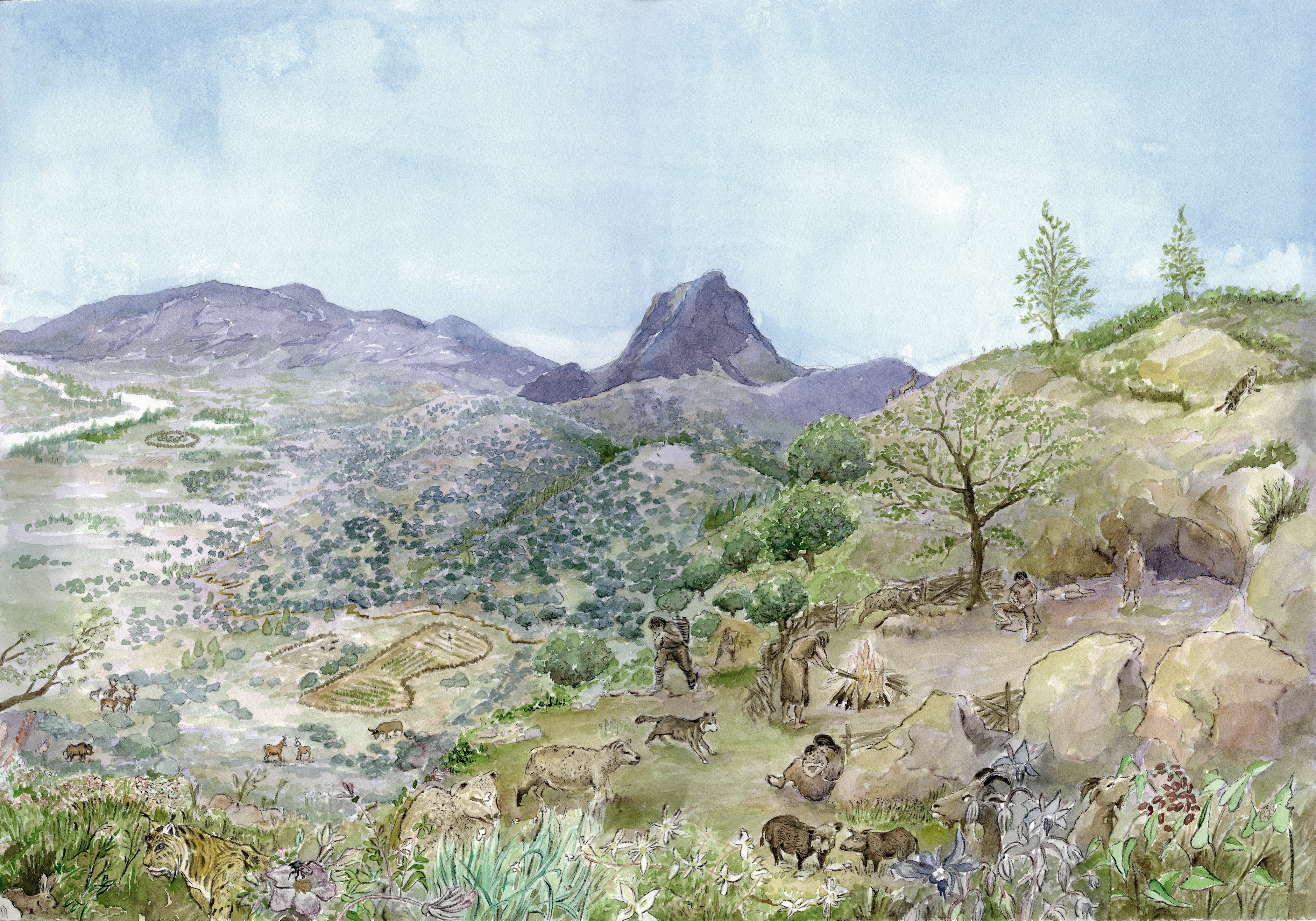 Paisatge amb la Fauna que hi havia a la Cova de Parpalló al neolític (F. Chiner)